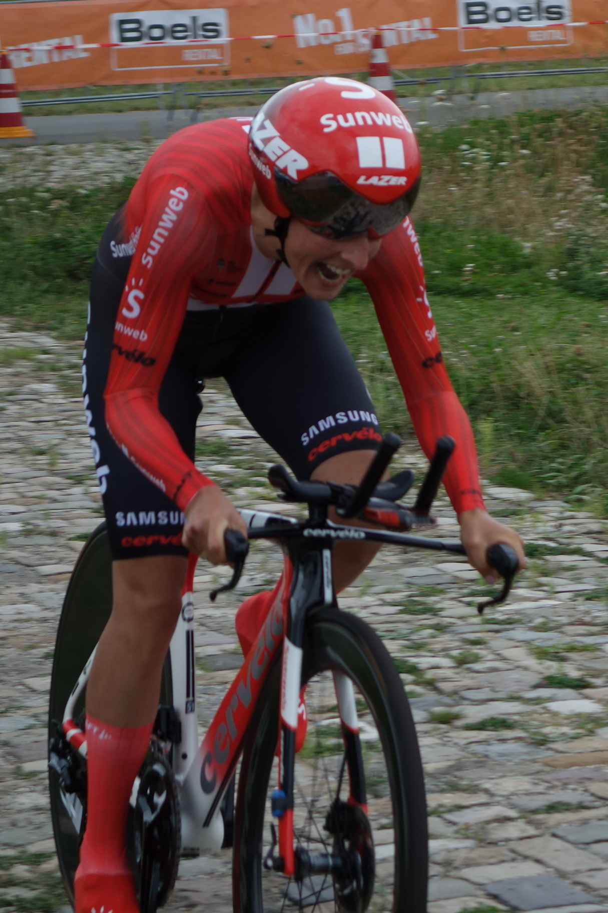 Lucinda Brand (Sunweb) bij de proloog op het Tom Dumoulin Bike Park in Sittard in de Boels Ladies Tour 2019